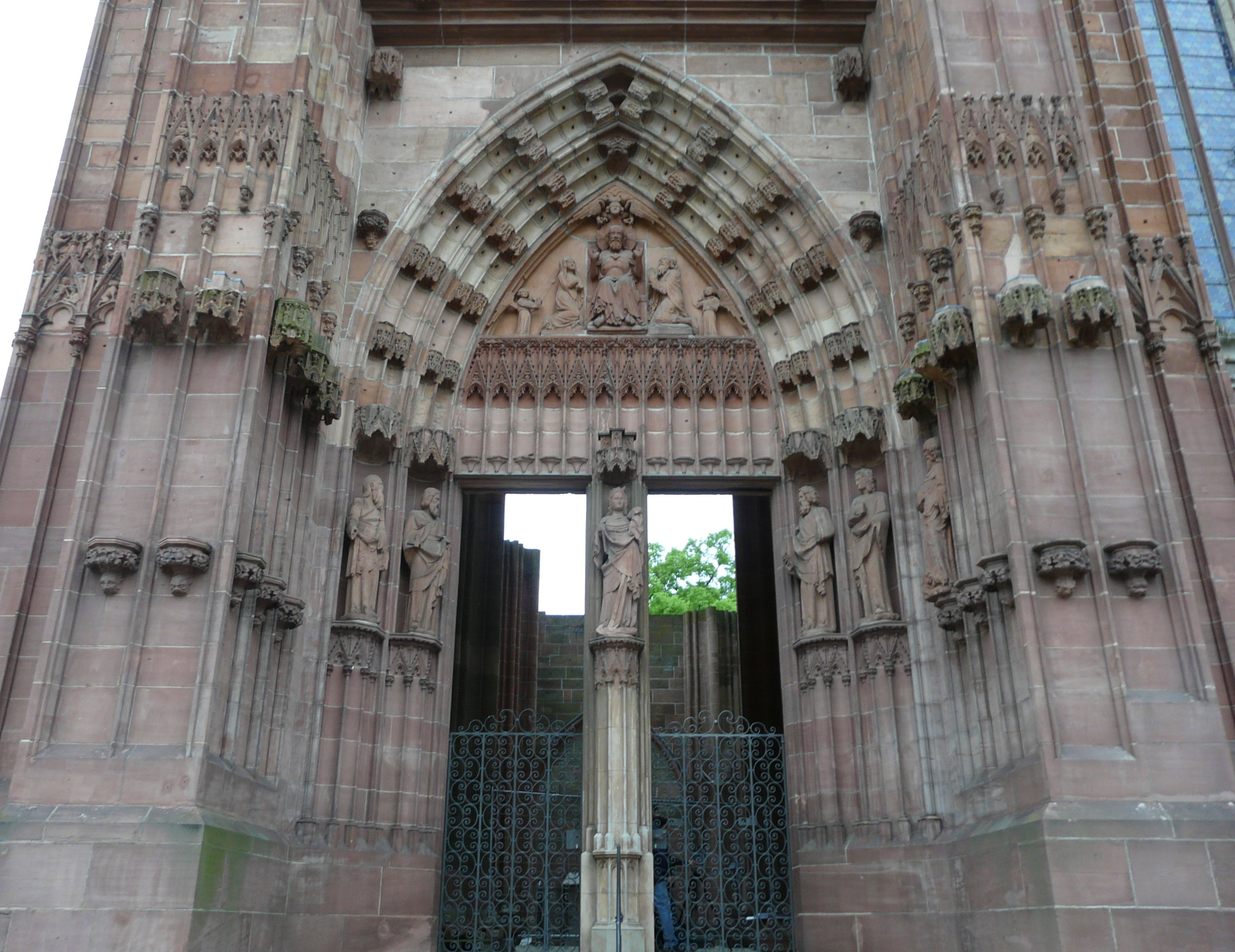 Portal am Südturm des Wetzlarer Doms, Hessen